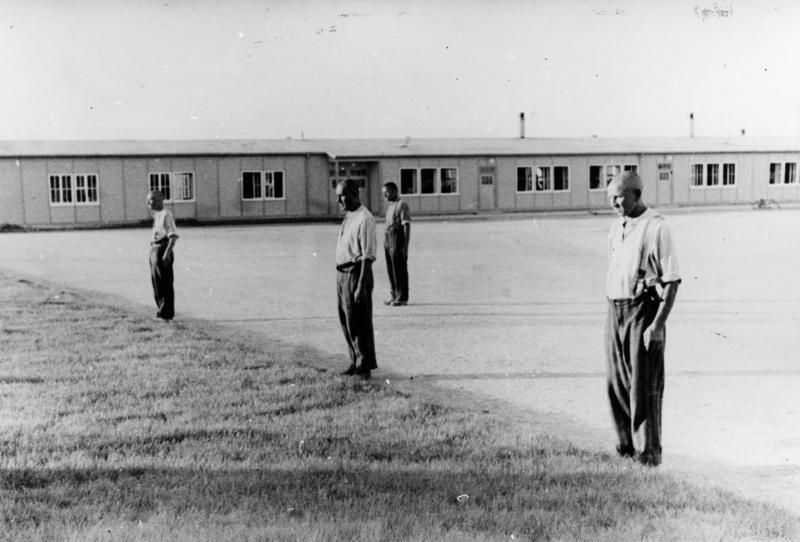 Dachau, Konzentrationslager Schutzhaftlager Dachau.- Häftlinge angetreten.